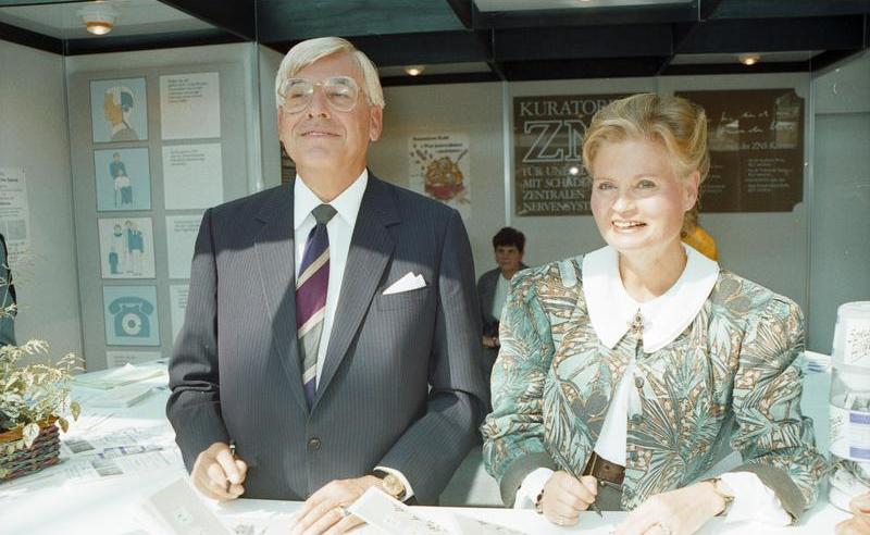 11.-13.9.1989 37. Bundesparteitag der CDU in der Bremer Stadthalle.